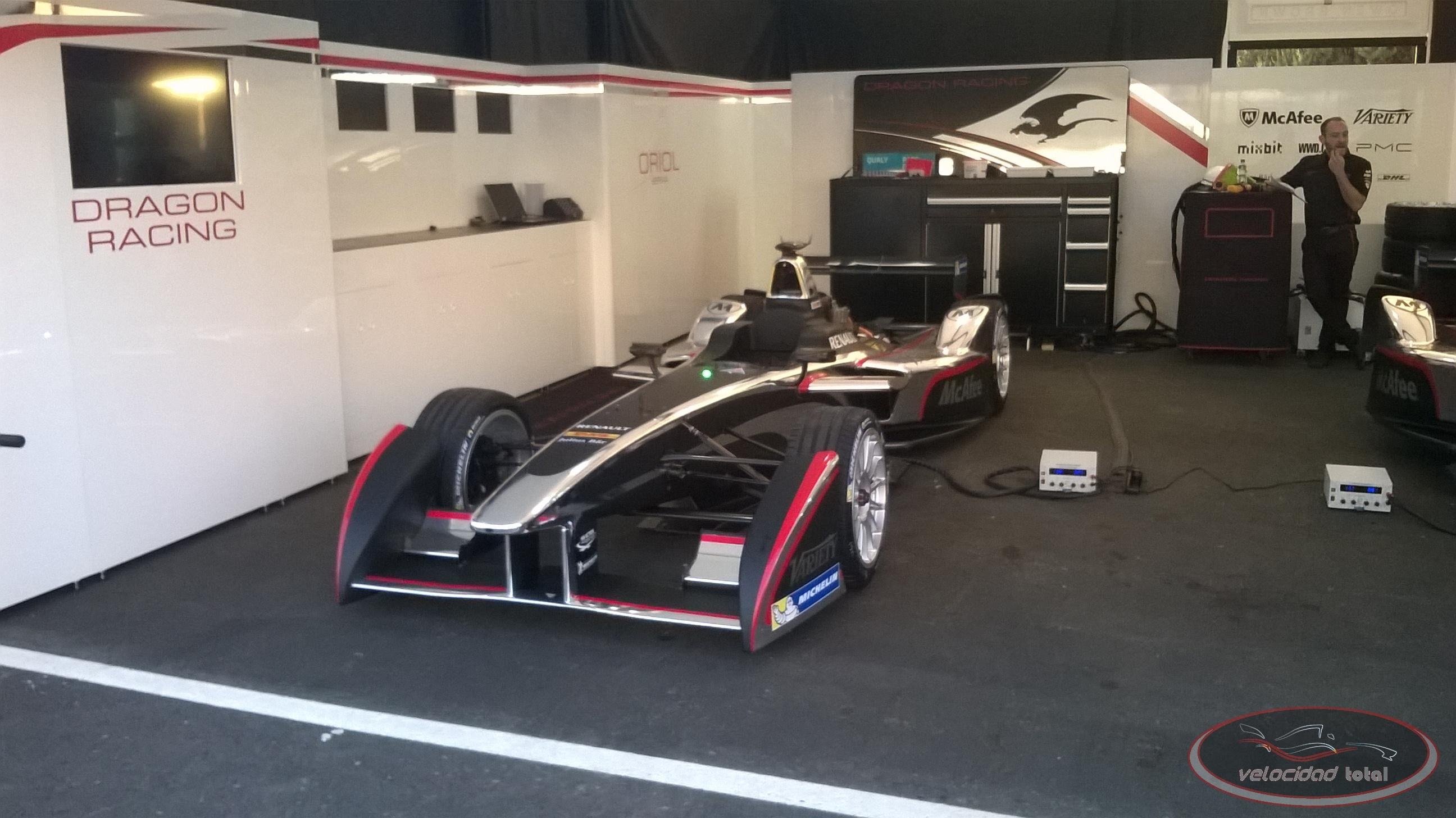 Solo se permite el uso de esta imagen mencionando a Velocidad Total como su autor. Imagen del equipo Dragon Racing de Fórmula E, durante el Punta del Este ePrix de 2014.